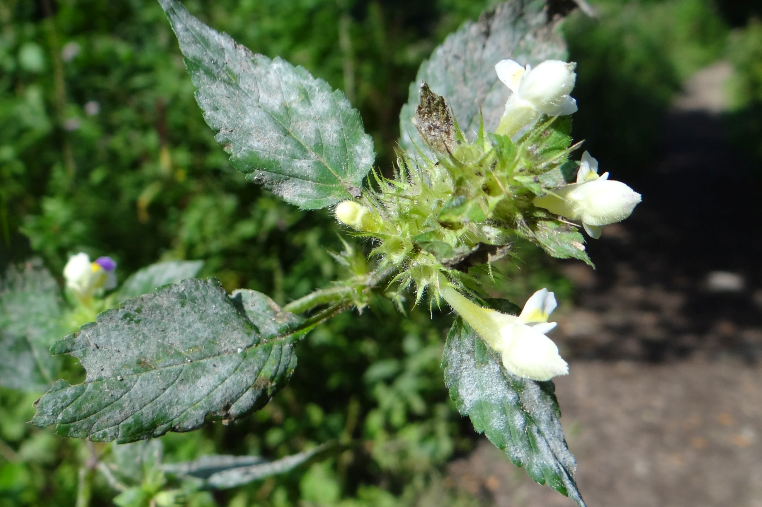 Neoerysiphe galeopsidis on Galeopsis tetrahit